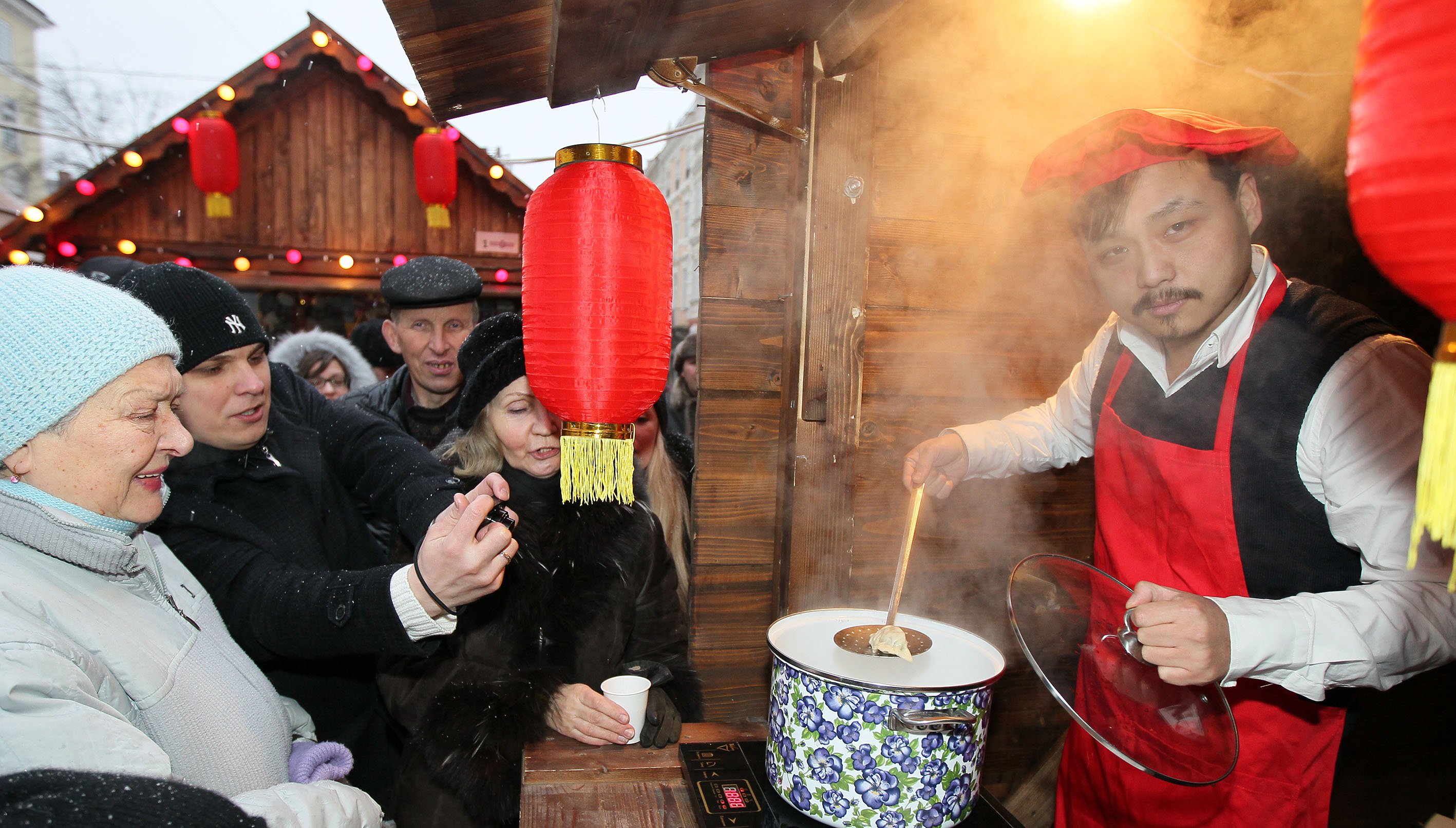 Ярмарок-презентація традиційних китайських страв